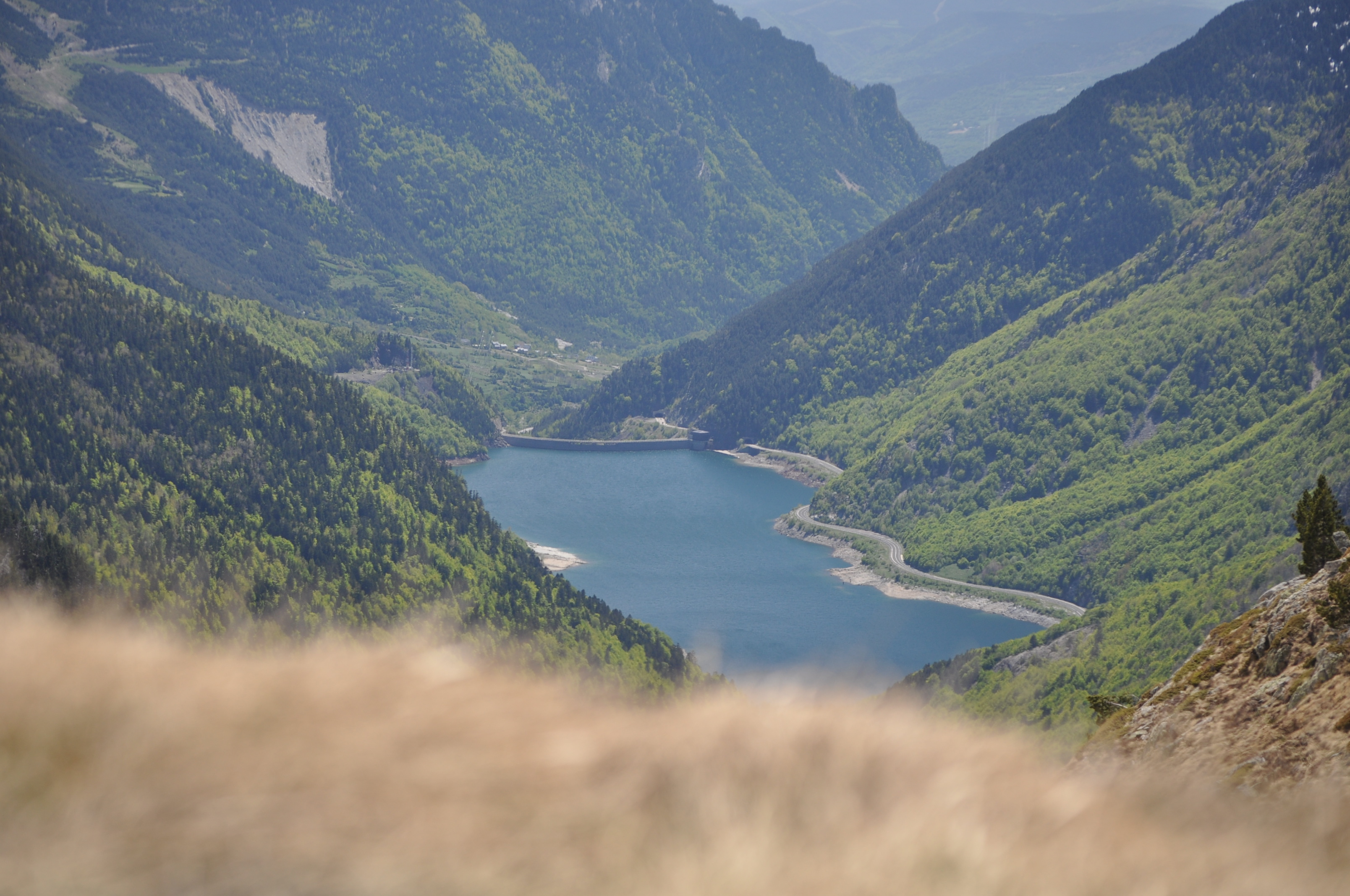 Pantà de Baserca vist des de l'Estanh Redon